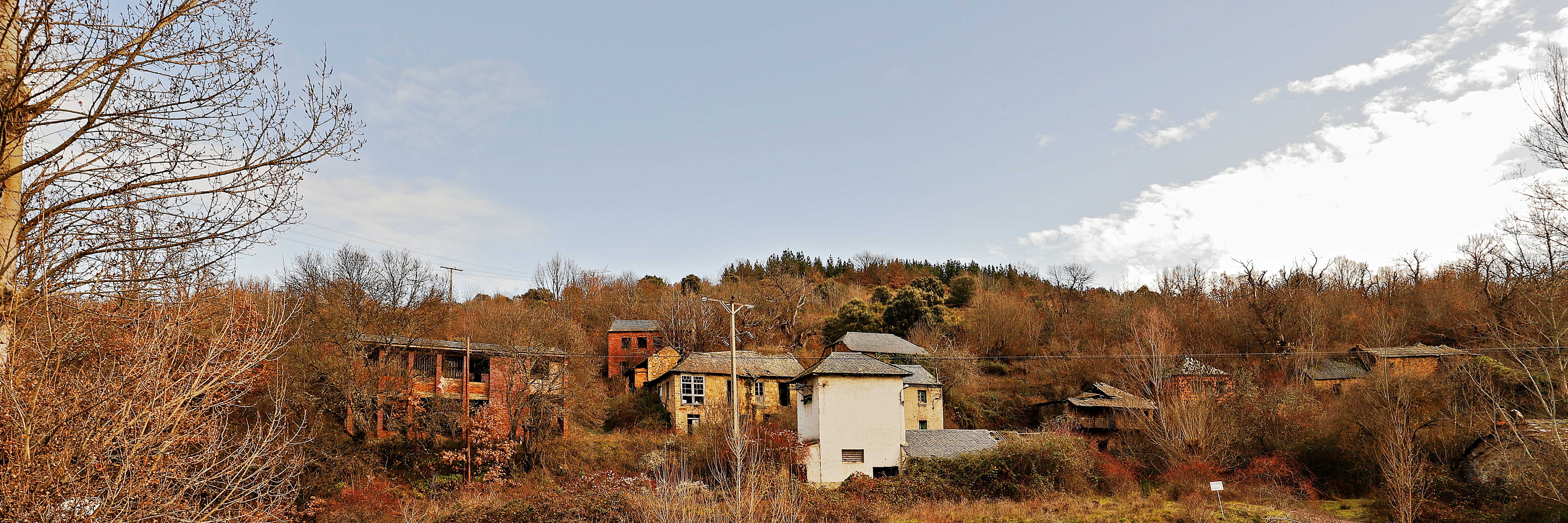 Cerezal de Tremor es un despoblado que pertenece al municipio de Torre del Bierzo, en la comarca de El Bierzo, provincia de León.